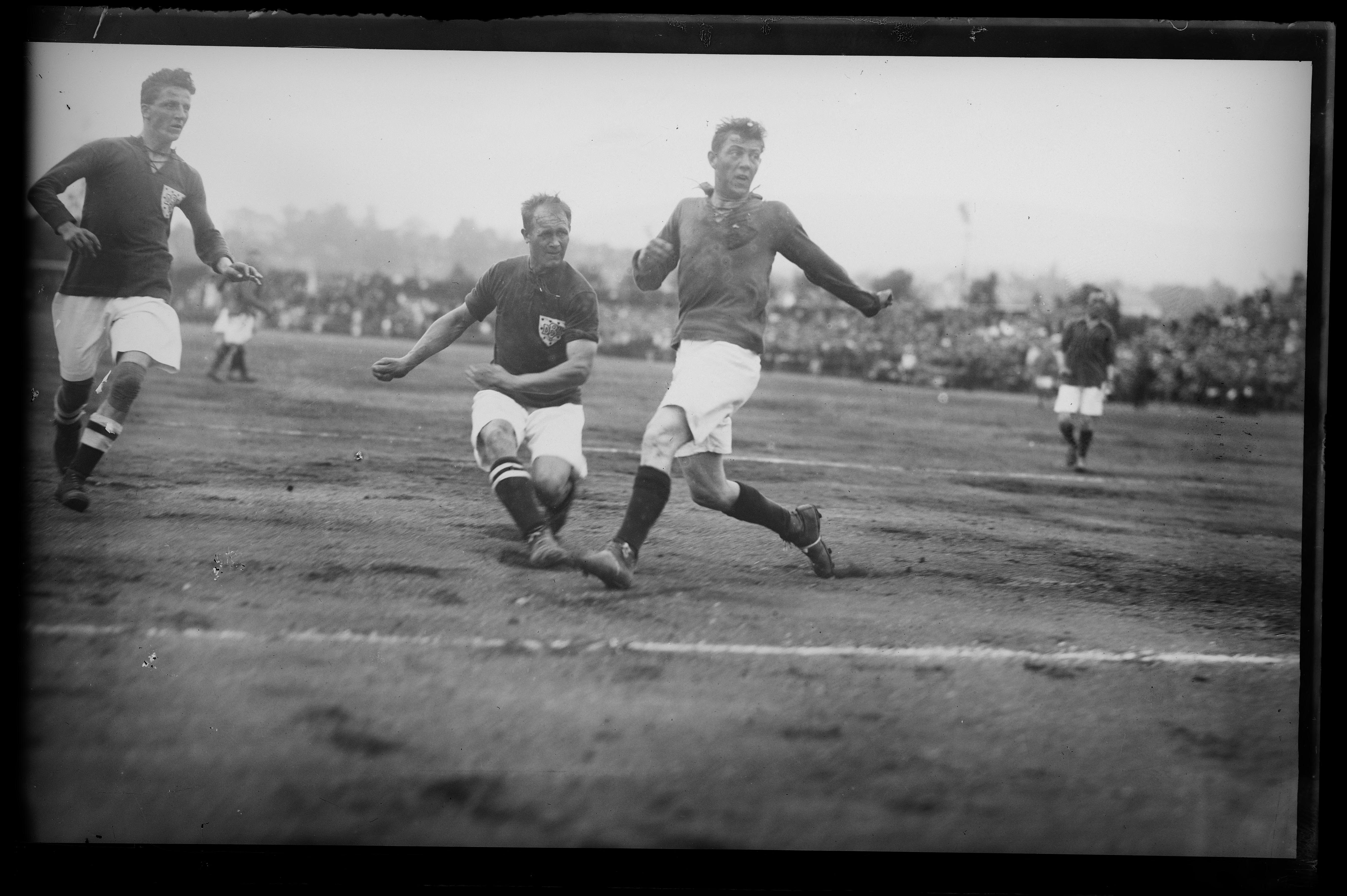 Bildet er hentet fra Nasjonalbibliotekets bildesamling. Anmerkninger til bildet var: Påskrift eske: Fotbol 1917 Frogner,Oslo, Oslo, Oslo